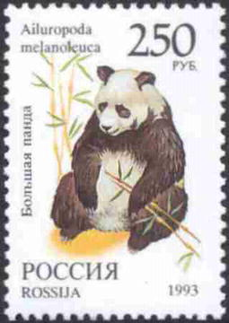 Почтовая марка России